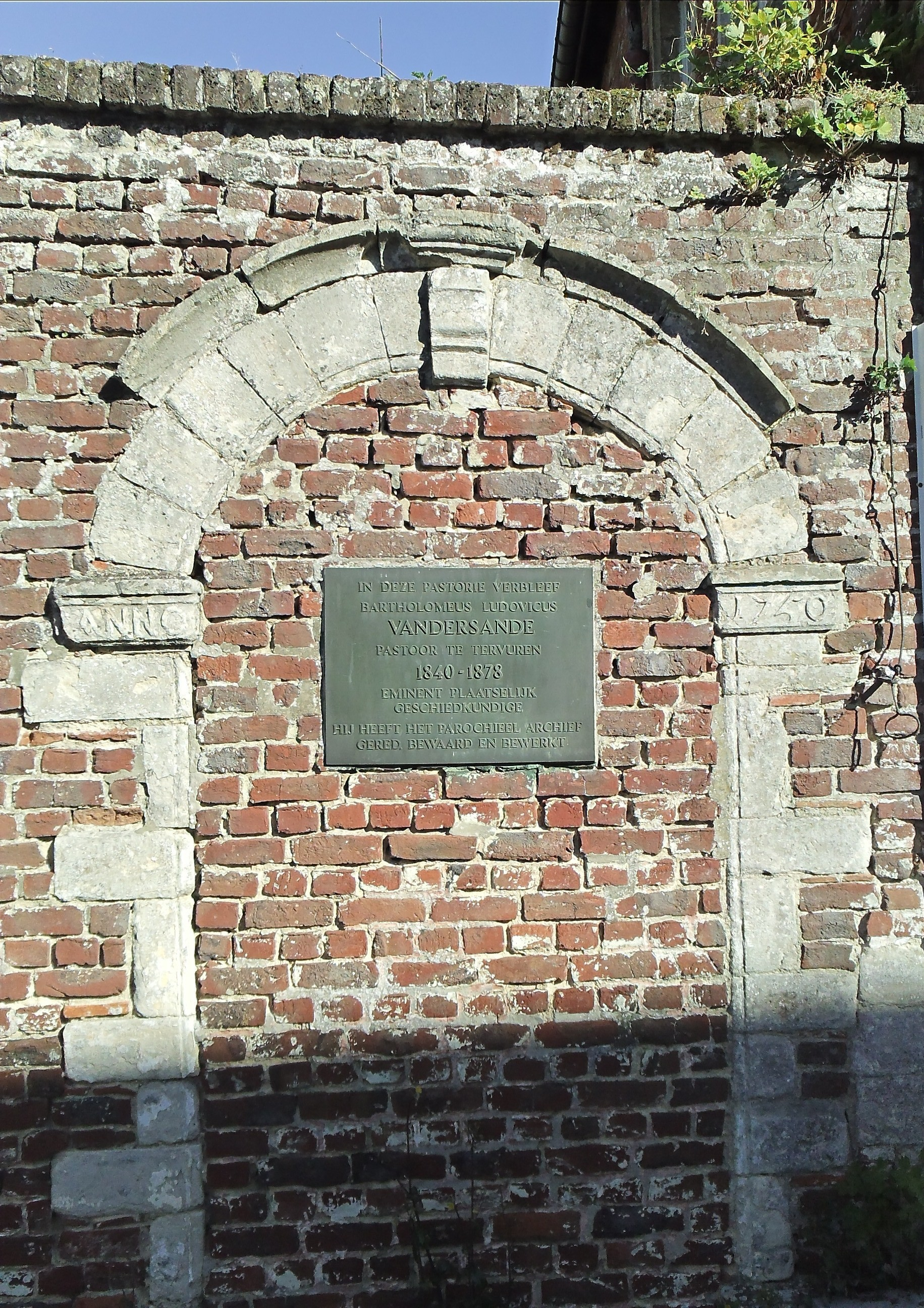 Pastorie Anno 1616, plaque pastoor Nl:Bartholomeus Ludovicus Vandersande Geschiedkundige